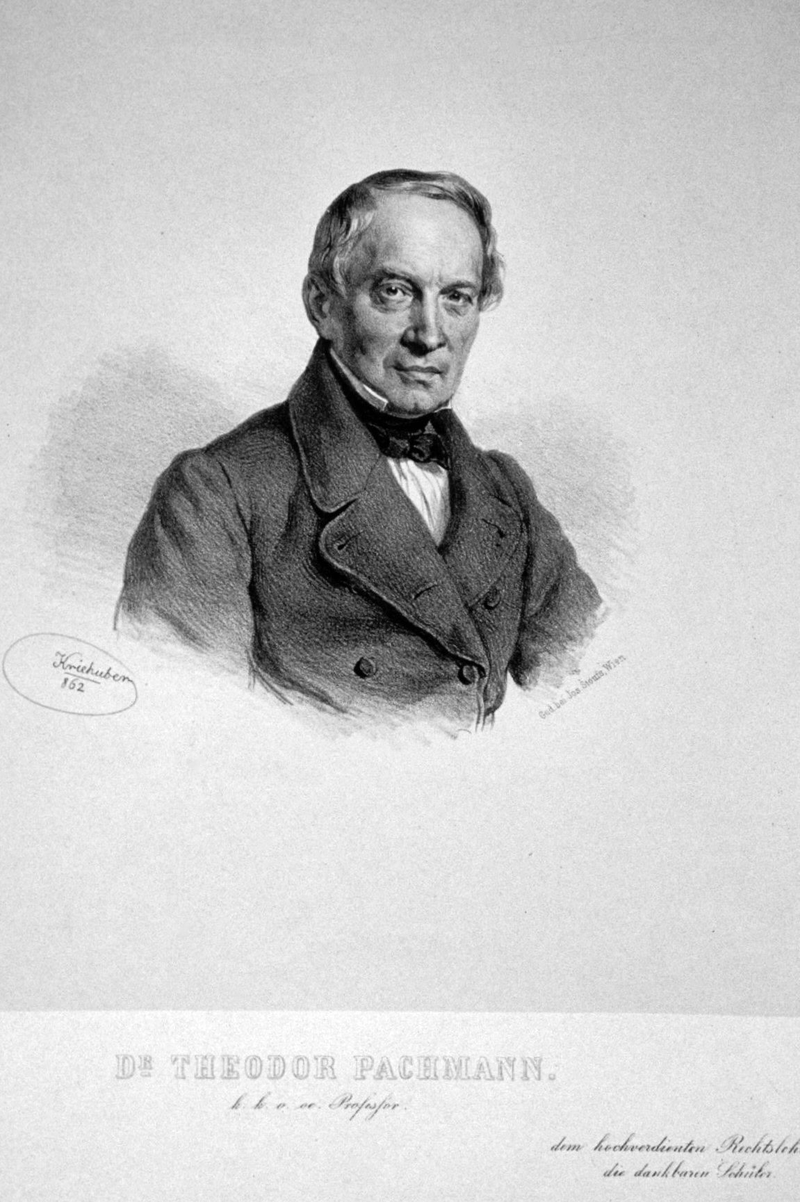 Theodor Pachmann (1801-1881), österreichischer Rechtsgelehrter. Lithographie von Josef Kriehuber, 1862